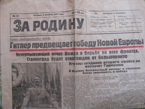 Газета «За родину» — оккупационная немецкая двухцветная газета выходившая с осени 1942 года до лета 1944 года.